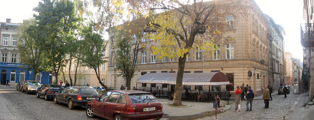 Площа Коліївщини і вулиця Староєврейська у Львові (частина єврейського кварталу)